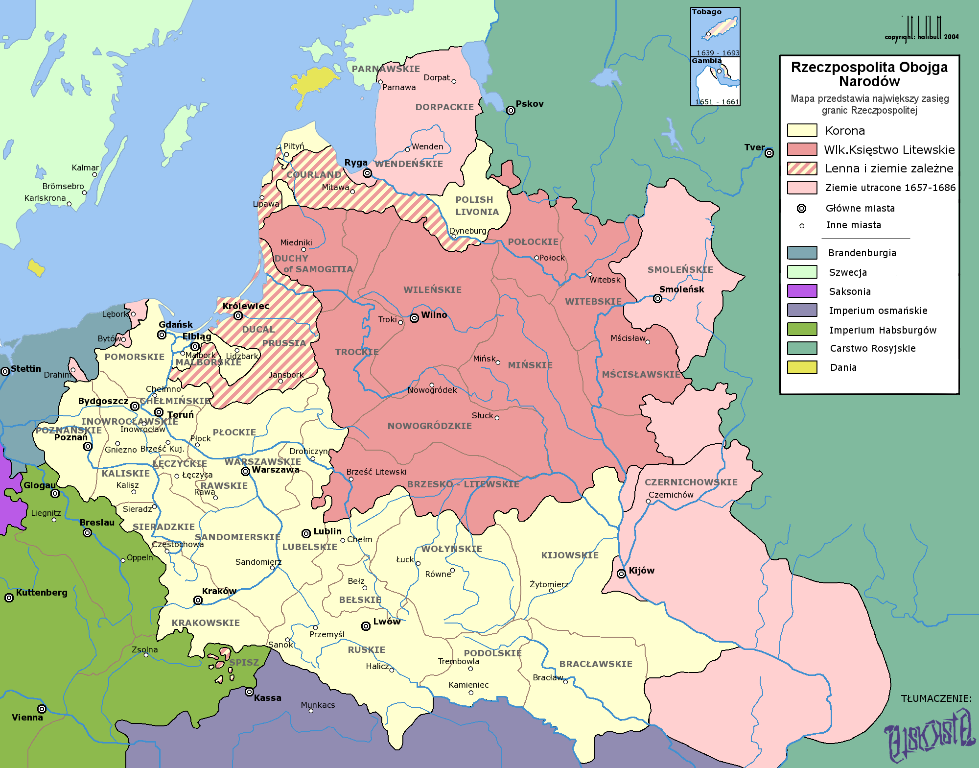 Przetłumaczona wersja mapy [1]